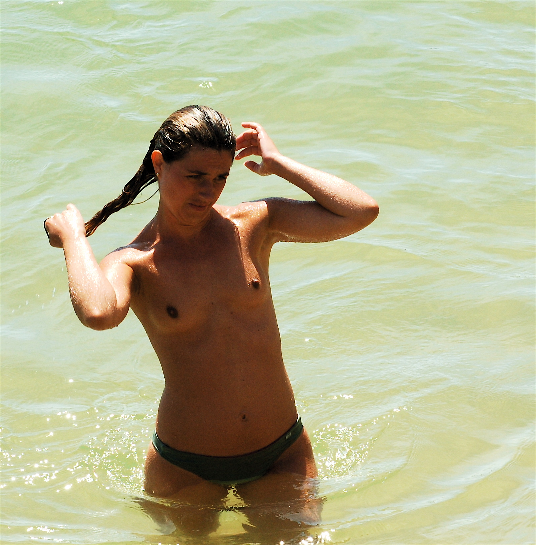 Cascais, PortugalWet